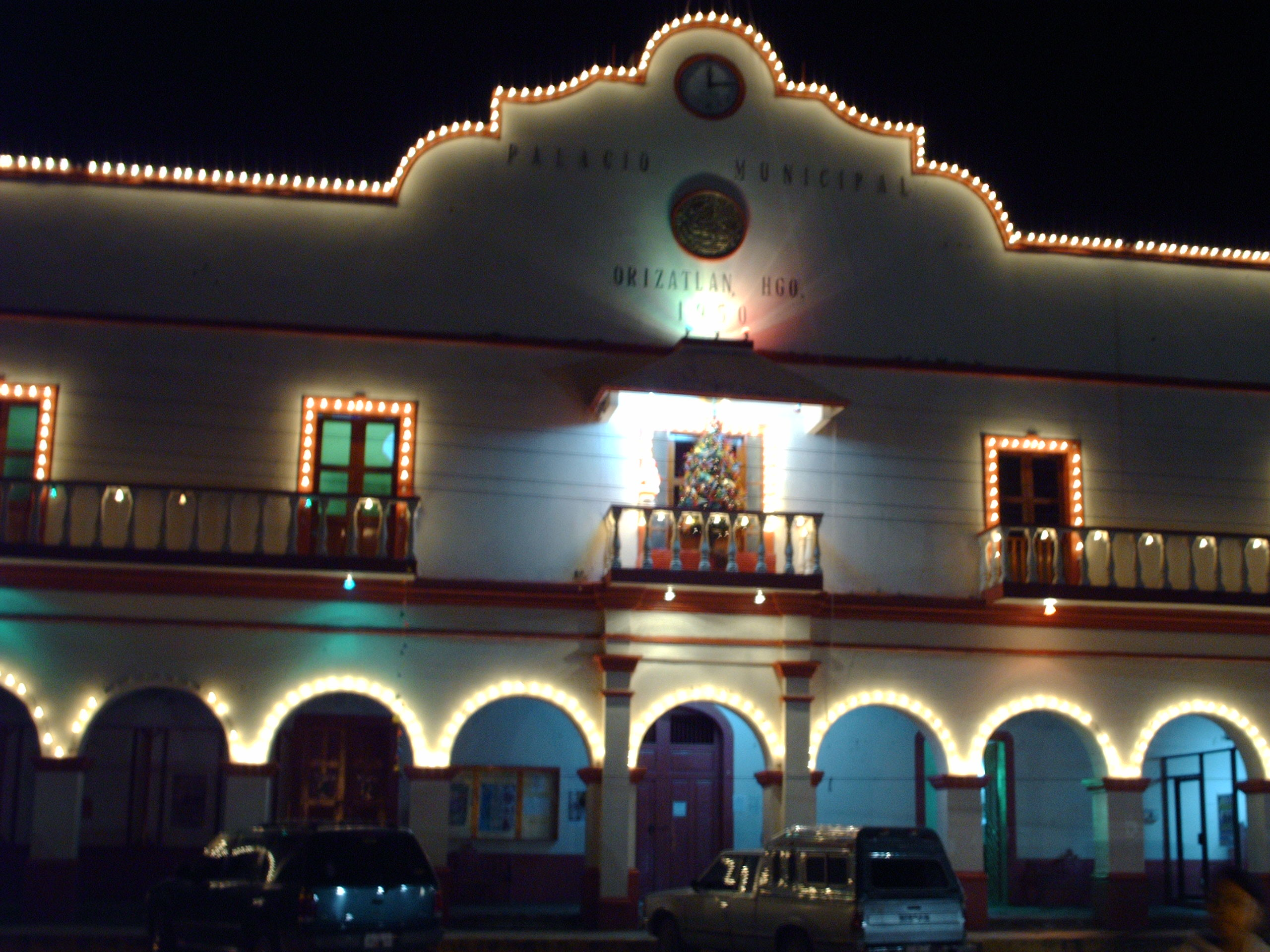 Presidencia de San Felipe Orizatlan